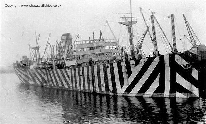 Der Frachter Gaelic Prince bei Fertigstellung 1918